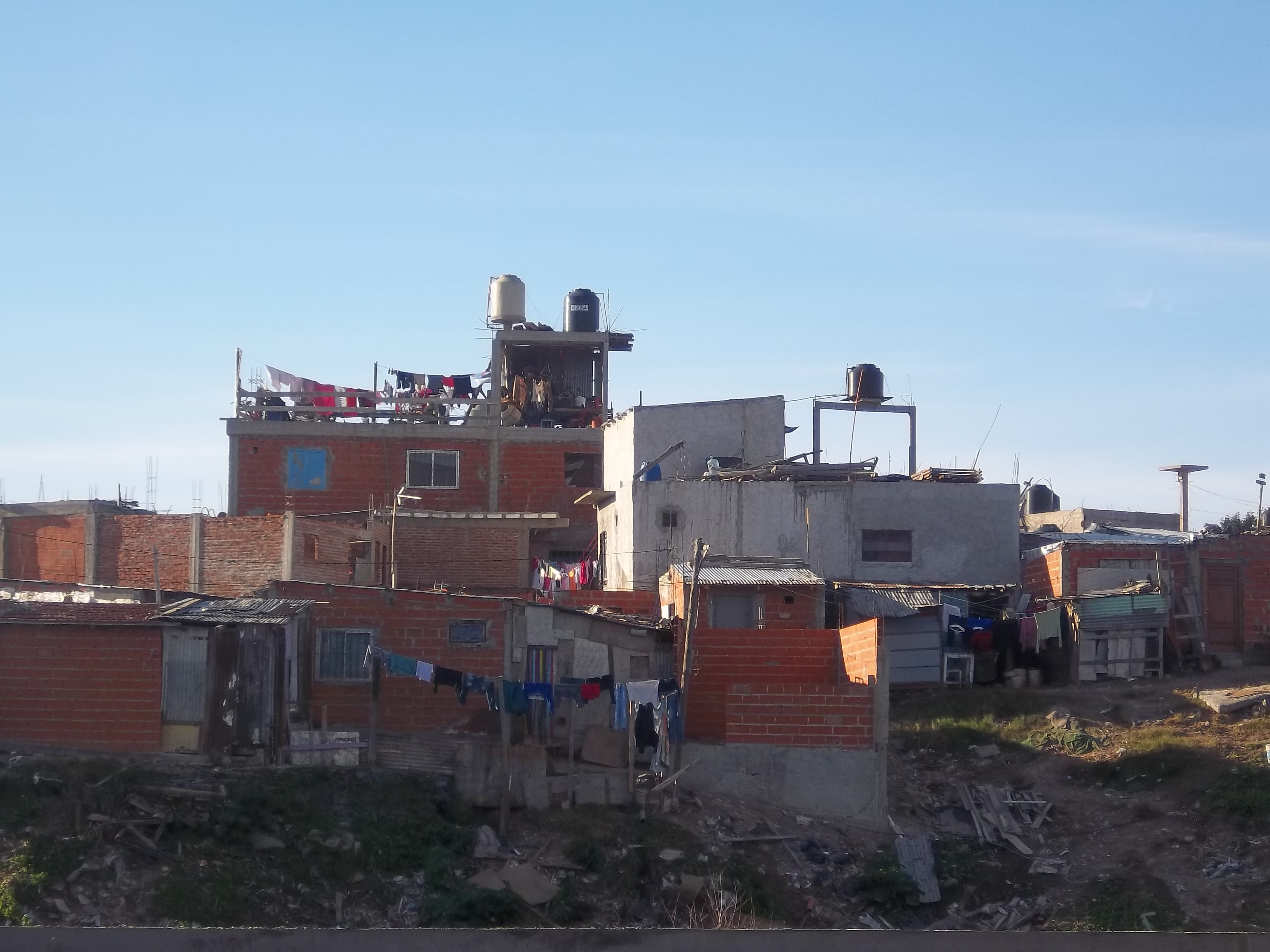 Villa 21-24 en el barrio de Nueva Pompeya de la ciudad de Buenos Aires desde Piñeyro, partido de Avellaneda, provincia de Buenos Aires, del otro lado del Riachuelo.